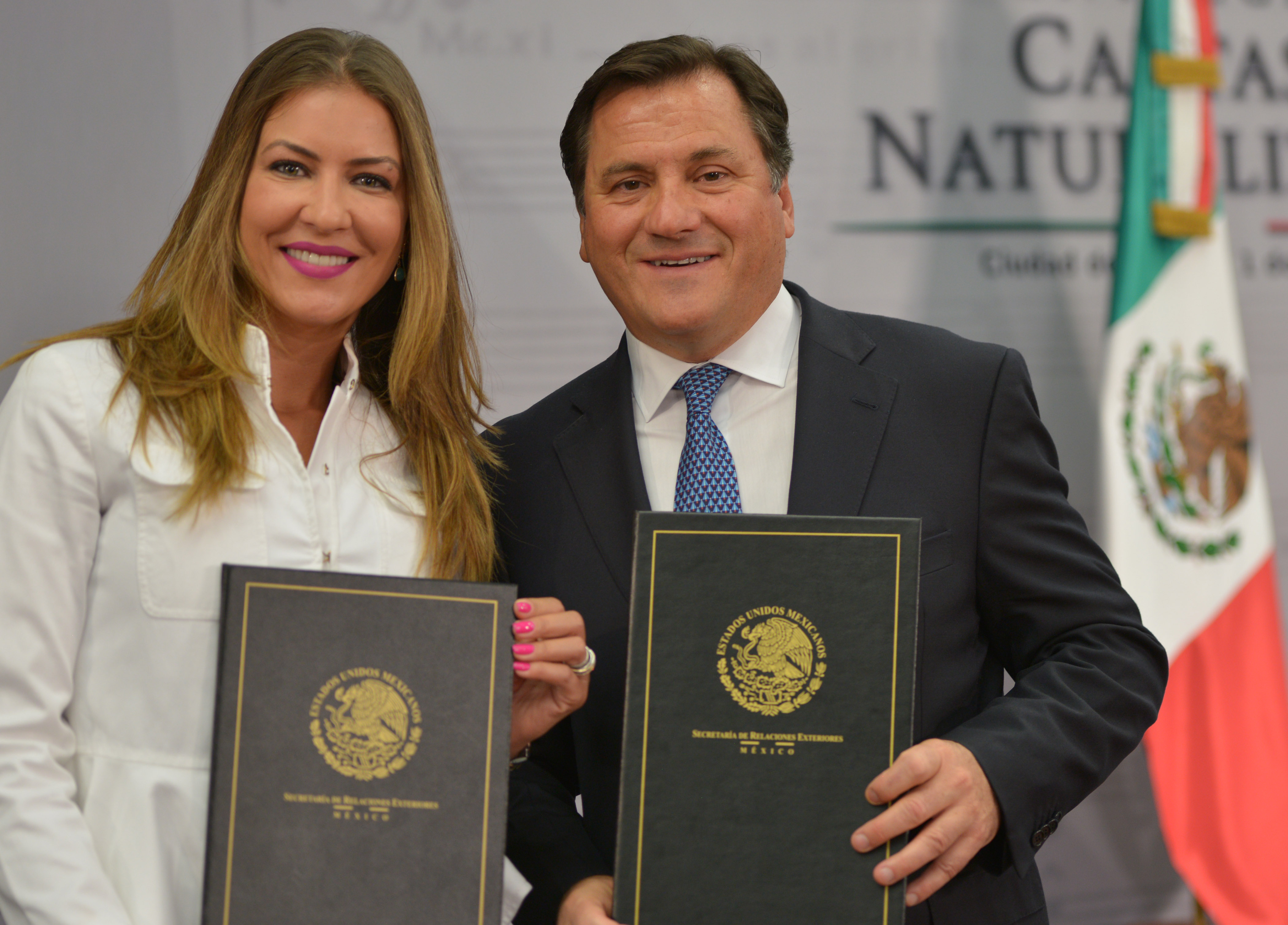 Nuevos mexicanos con sus cartas de naturalización Residencia Oficial de los Pinos, Ciudad de México. 01 de abril de 2015.